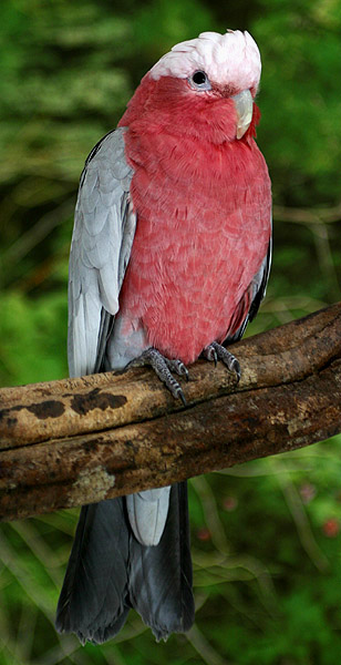 Rosakakadu Thomas Schultz